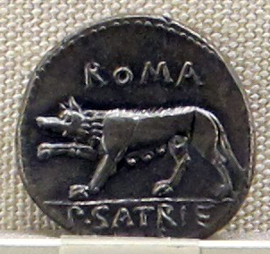 Ancient Roman coins in the Palazzo Massimo alle Terme